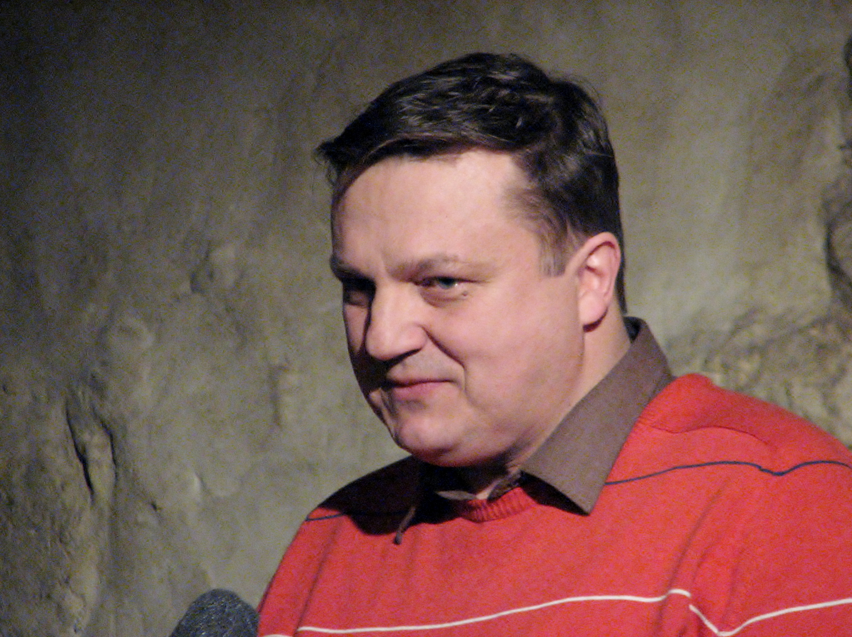 Jaak Prozes esinemas "Vadja keele sõnaraamatu" esitlusel Kloostri Aidas